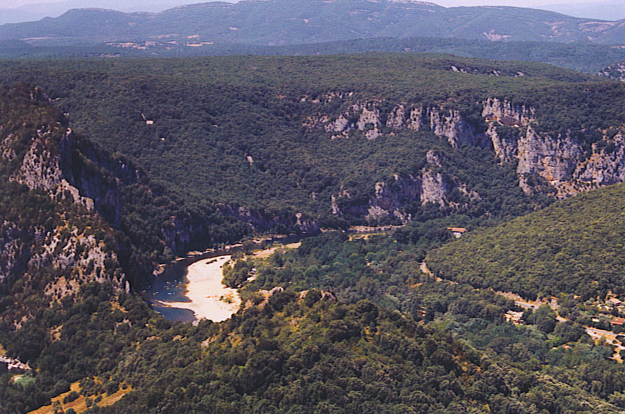 self made